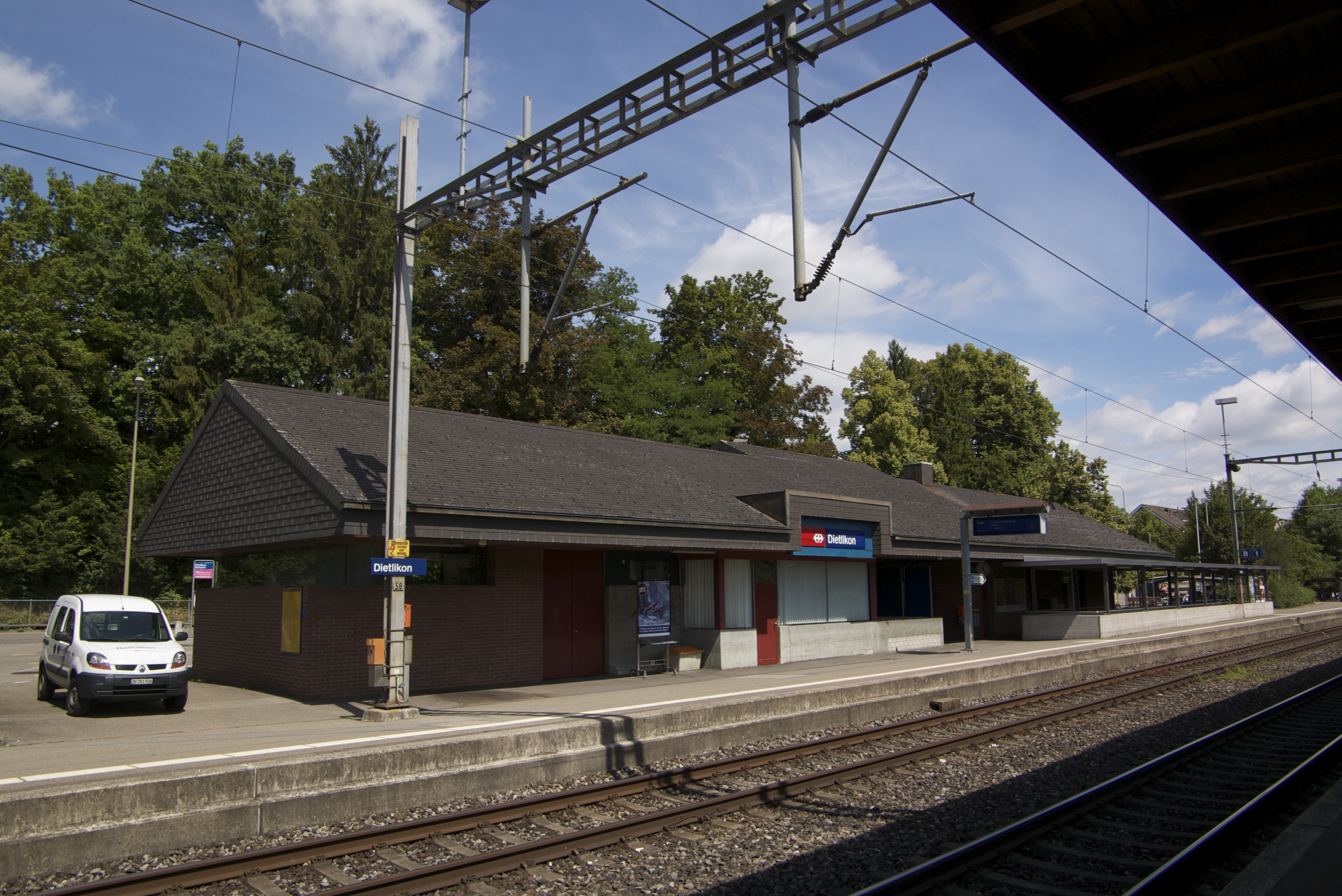 Bahnhofgebäud Dietlikon.